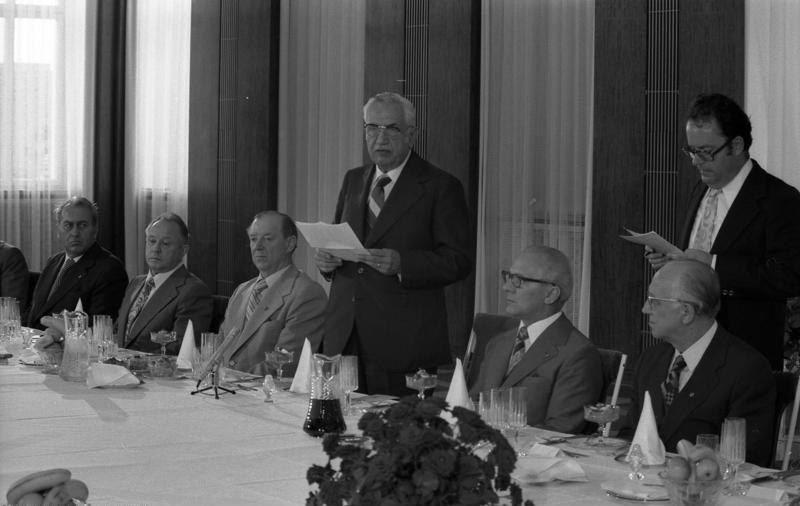 Berlin, Besuch libanesischen Delegation ADN-ZB/Koard 23.6.78 Berlin: Der Generalsekretär des ZK der SED und Vorsitzender des Staatsrates der DDR, Erich Honecker (2.v.r.), gab am 23.6.78 für die in der DDR weilende Delegation der Libanesischen Kommunistischen Partei unter Leitung des Generalsekretärs des ZK der LKP, Nicolas Chaoui (stehend), im Palais Unter den Linden ein Essen. [v.l.: Konrad Naumann, Erich Mielke, Gerhard Grüneberg, Chaoui, Erich Honecker, Horst Sindermann] Abgebildete Personen: Mielke, Erich: Minister für Staatssicherheit, Armeegeneral, Politbüro des Zentralkomitees (ZK) der SED, DDR (GND 118977490) Honecker, Erich: Staatsratsvorsitzender, Generalsekretär des ZK der SED, DDR (GND 118553399) Chaoui, Nicolas: Generalsekretär der KP, Libanon Naumann, Konrad: 1. Sekretär Bezirksleitung Berlin der SED, Staatsratsmitglied, DDR Grüneberg, Gerhard: Mitglied des Politbüros, Sekretär des ZK der SED, DDR Sindermann, Horst: Volkskammerpräsident, stellvertretender Staatsratsvorsitzender, DDR